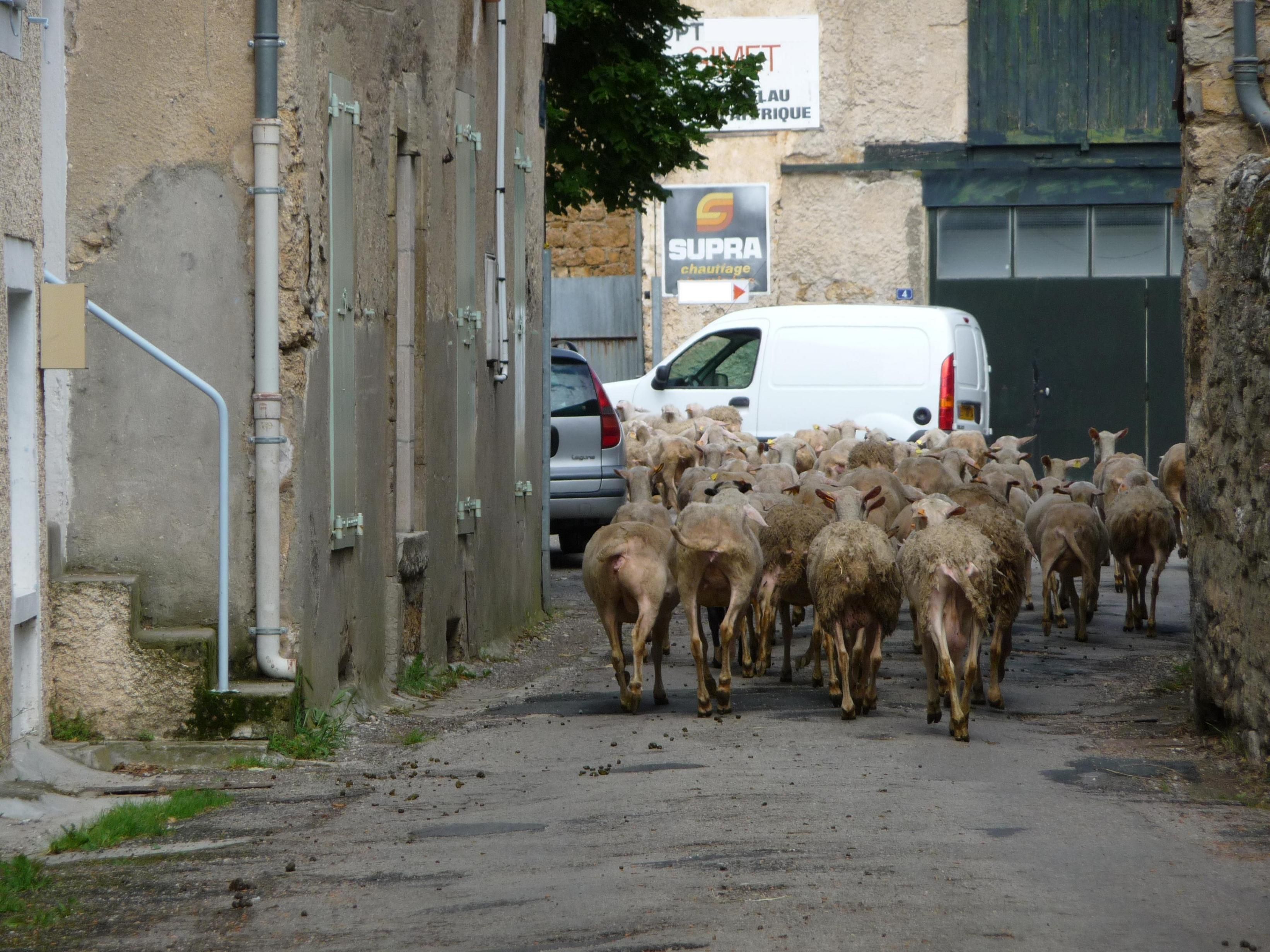 Troupeau de brebis laitières dans les rues du bourg de Nant